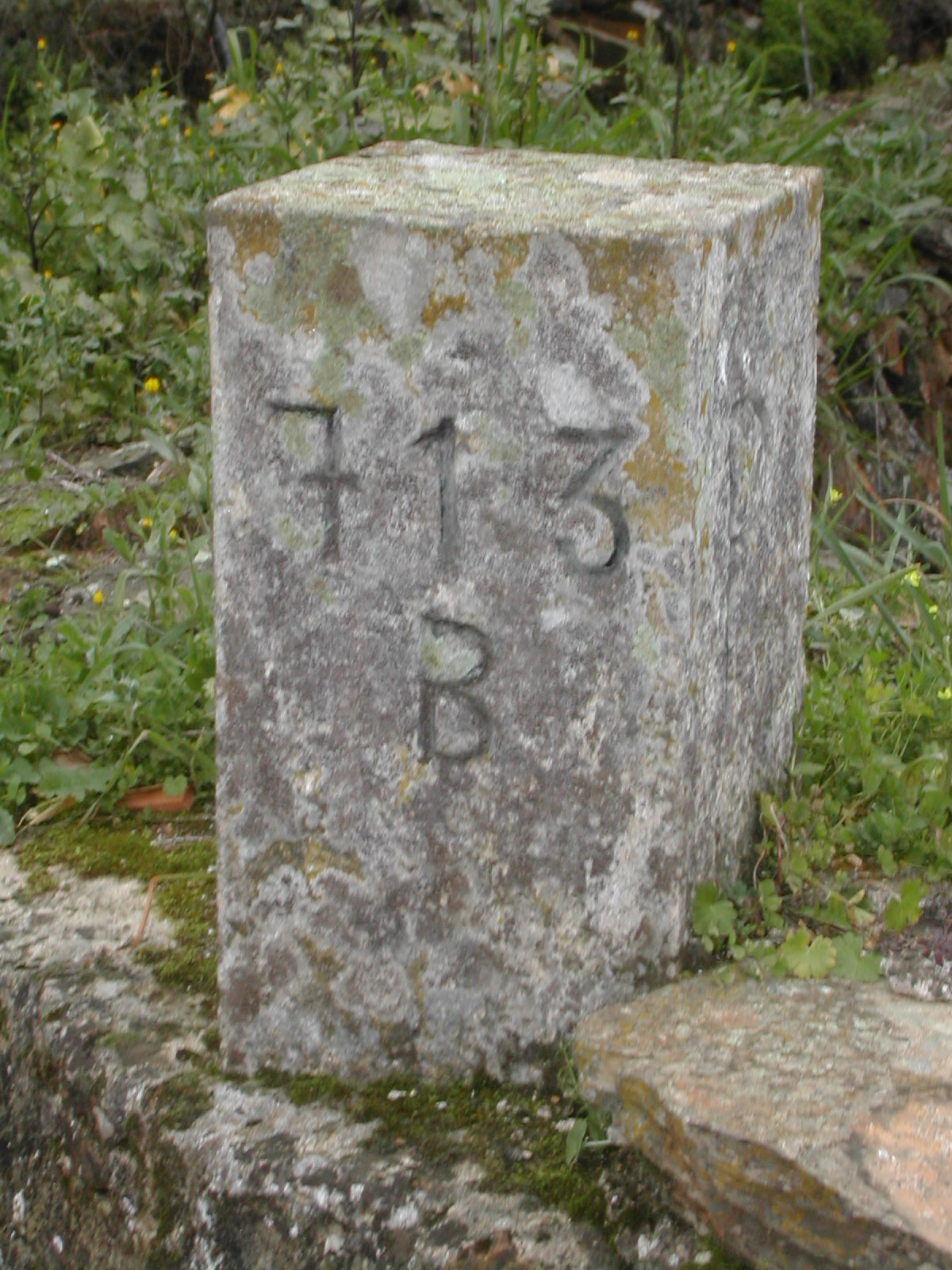 Marco fronteiriço 713B na povoação do Marco